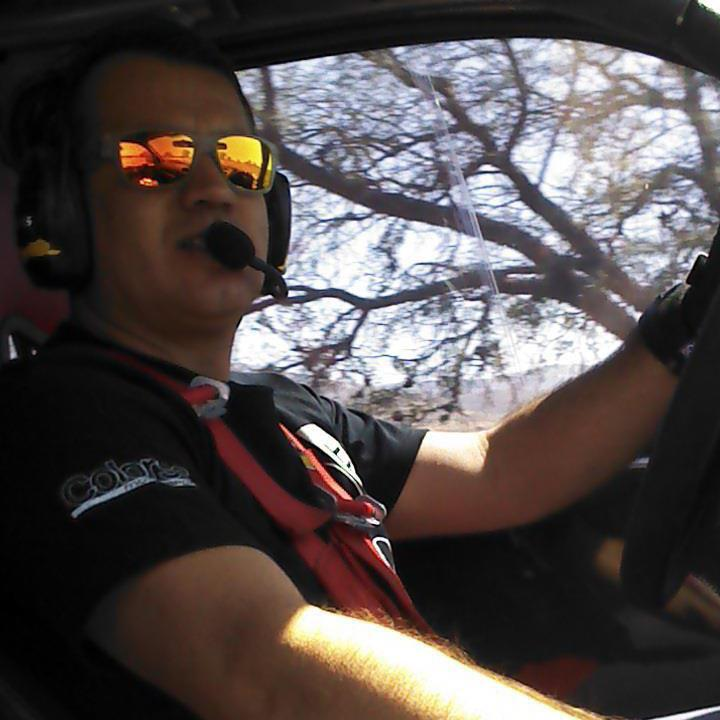 Piloto Carlos Tejada